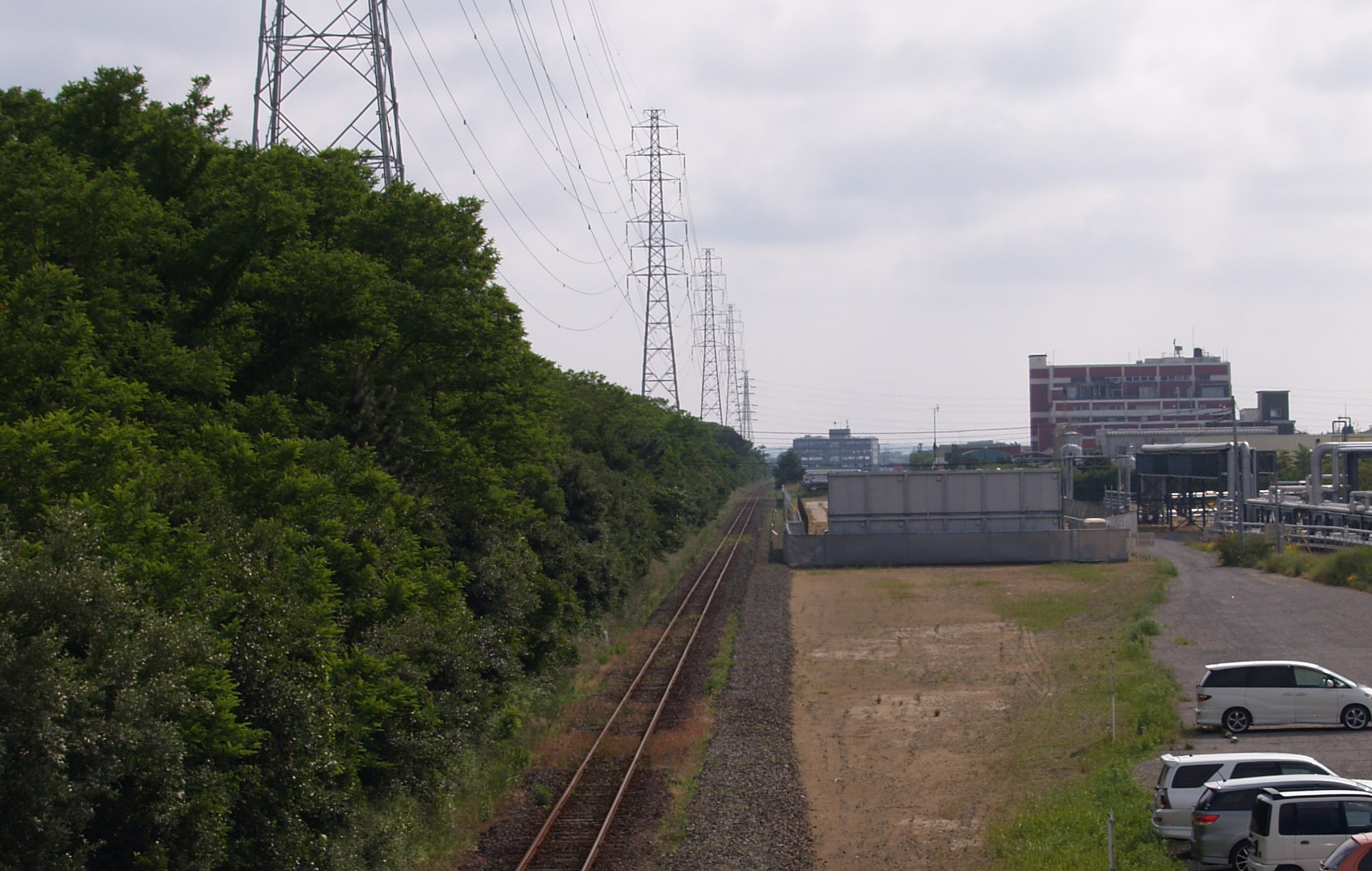 鹿島臨海鉄道ja:知手駅付近